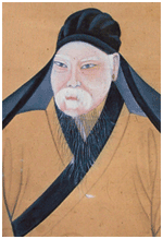 朴趾源作、課農小抄